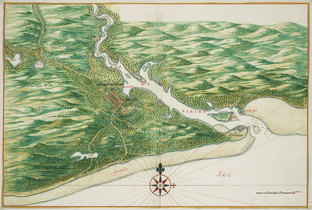 Estuário do Rio Paraíba do Norte Plattegrond van Frederik Stadt/Paraíba, João Pessoa, Brasil